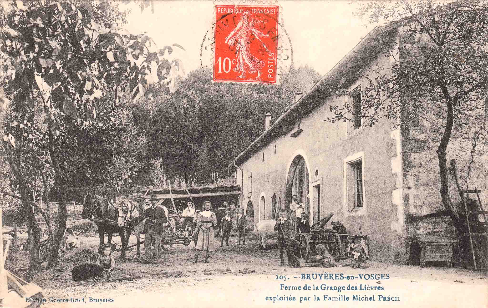 Carte postale ancienne "BRUYÈRES-en-VOSGES Ferme de la Grange des Lièvres exploitée par la Famille Michel PRÉCIL"